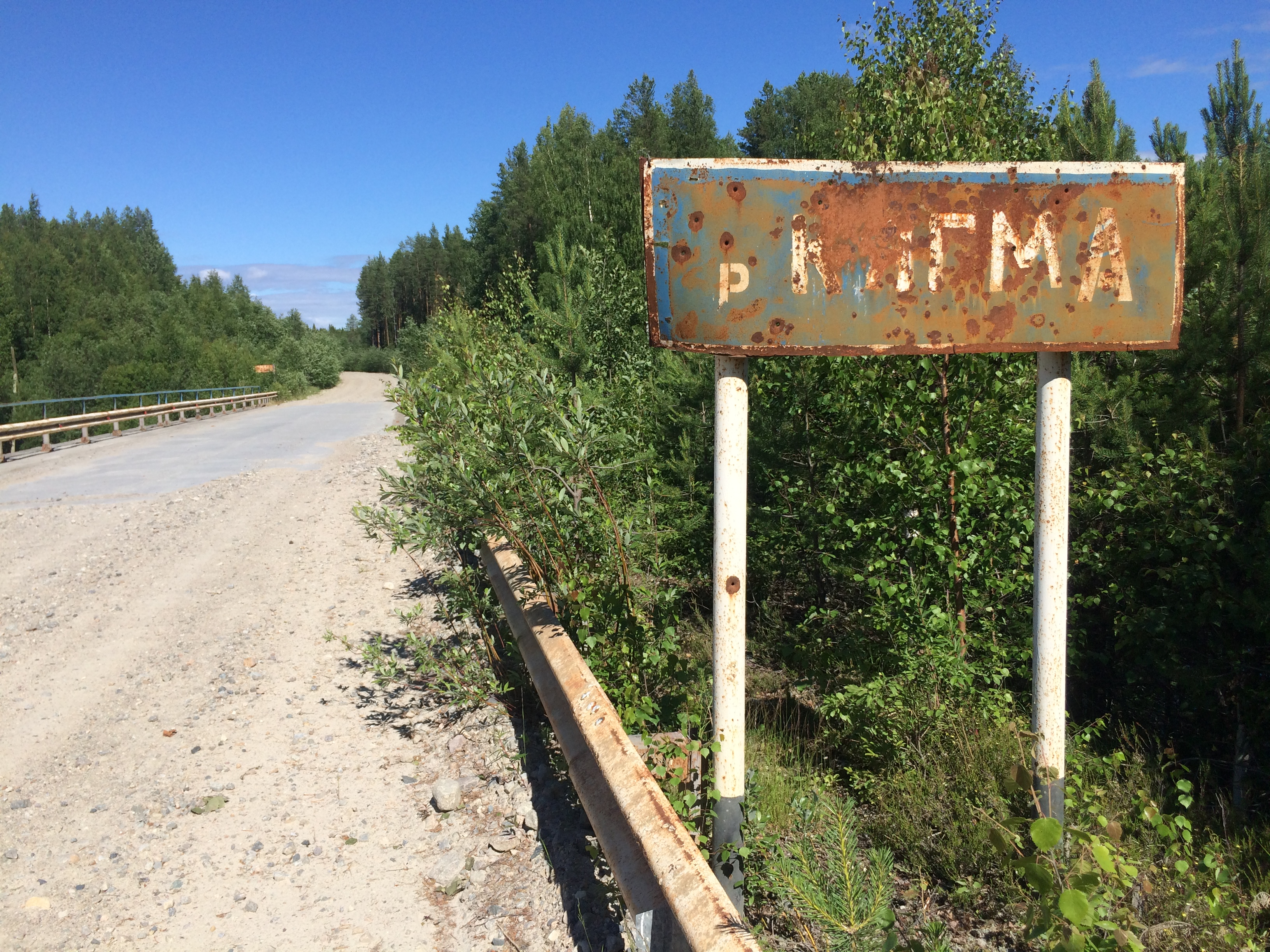 Кягма